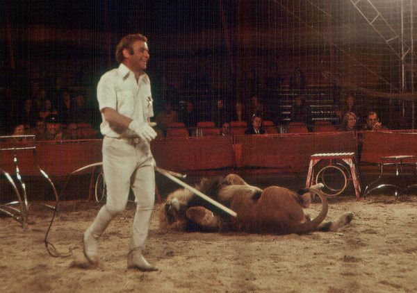 Zirkusdirektor und Löwen-Dresseur Gerd Siemoneit-Barum bei einer Vorstellung in Nordenham, Niedersachsen.